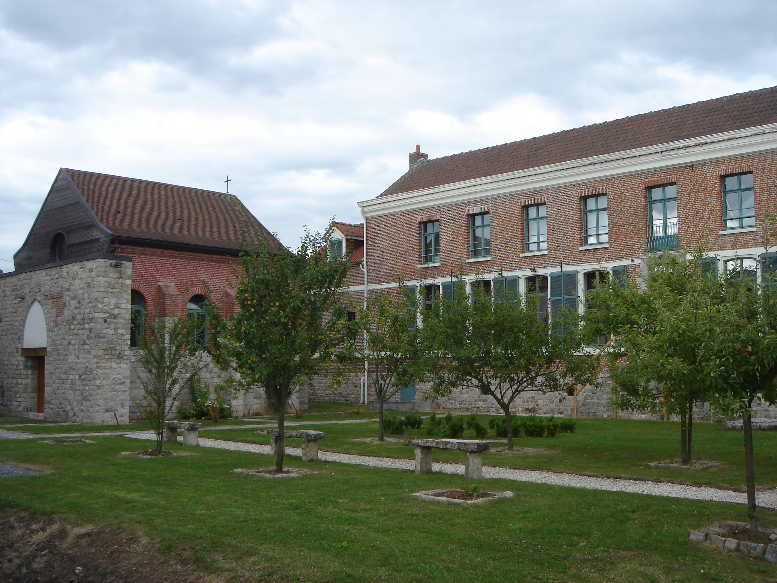 Abbaye d' Hamage, Rue de la faïencerie à Wandignies-Hamage